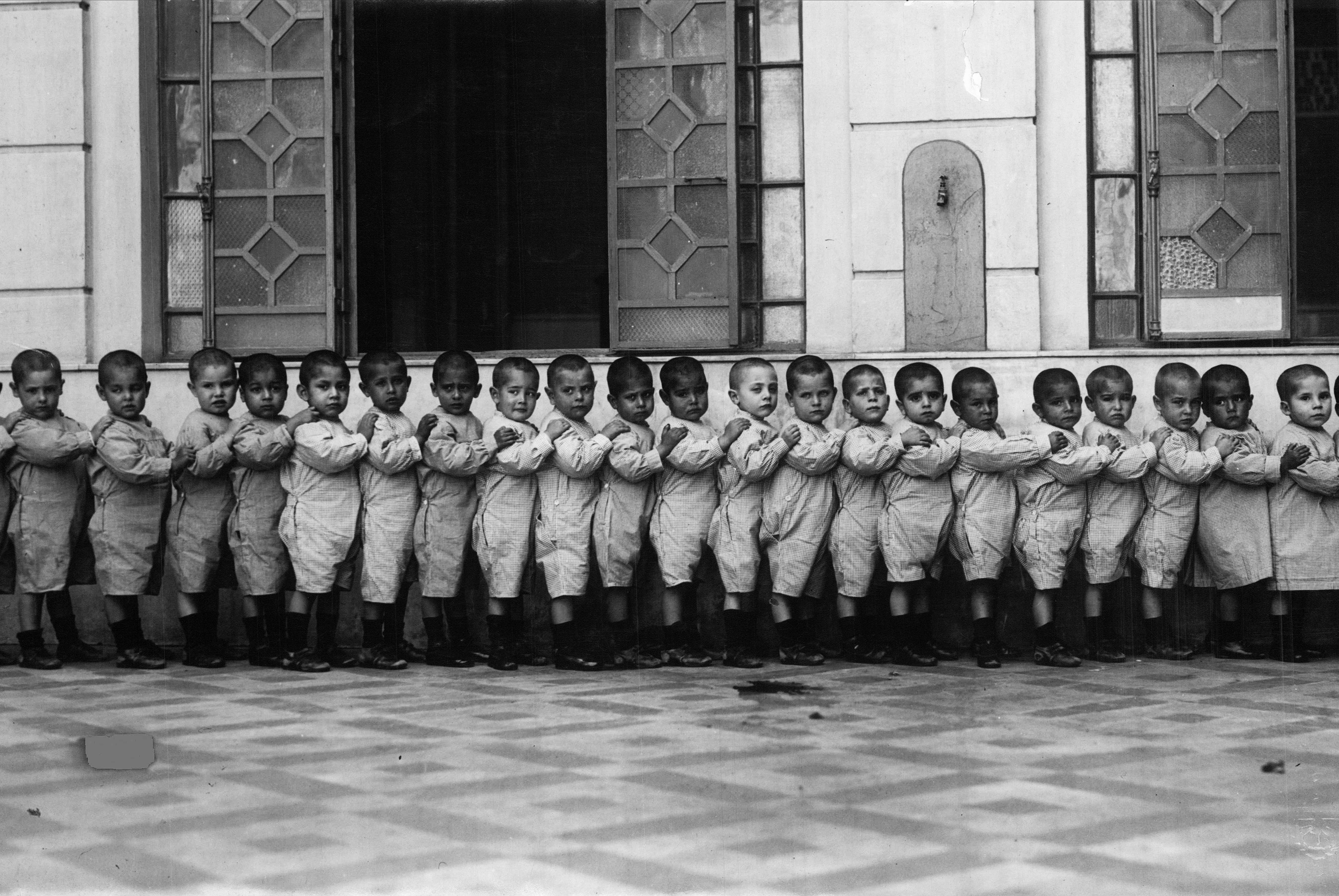 Children at "Patronato de la Infancia", an orphanage in Buenos Aires.